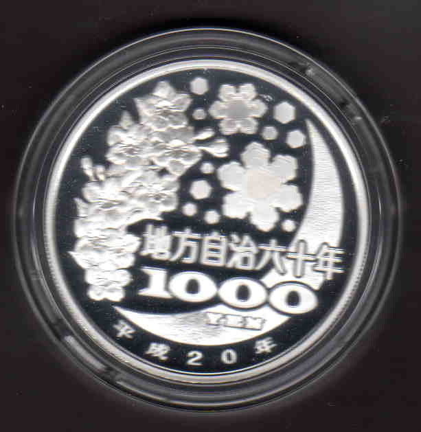 地方自治法施行60周記念貨幣の共通デザイン